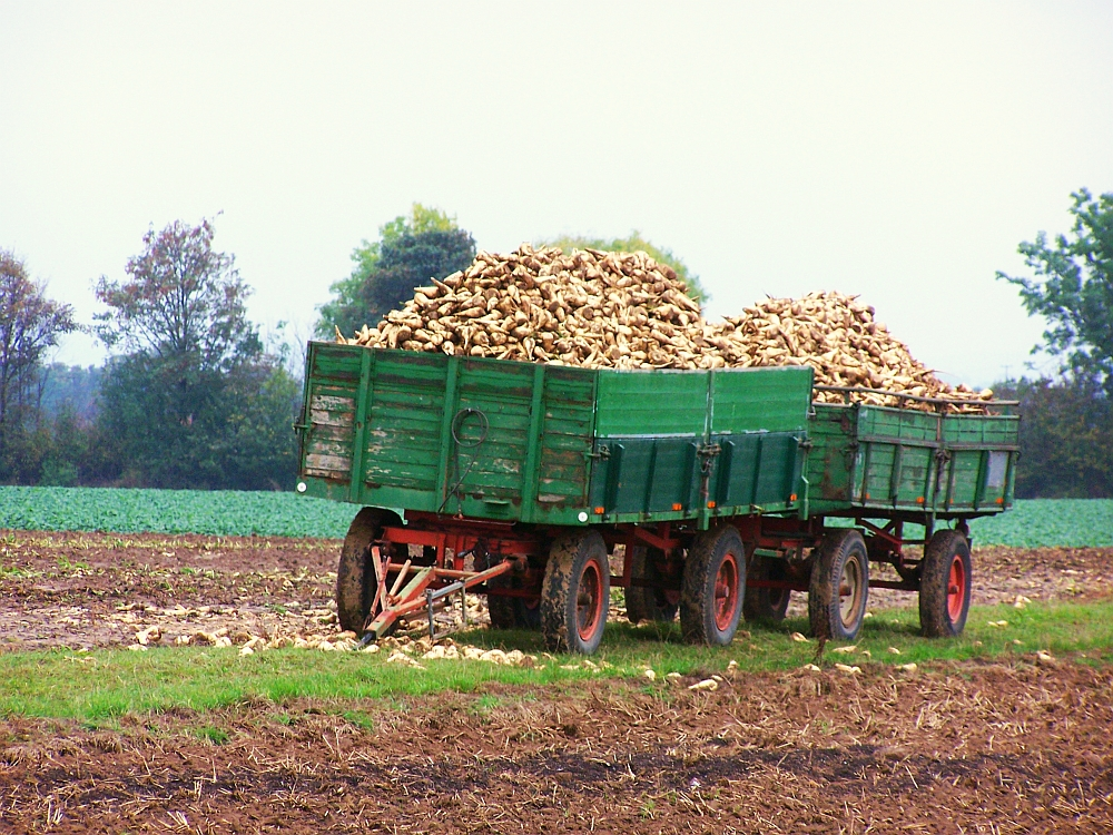 Rübenernte – zwei Anhänger mit Rüben an einem Feld